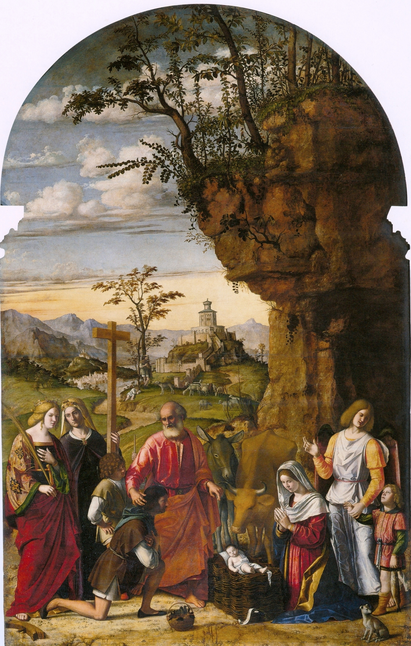 CIMA da Conegliano Adoration of the Shepherds Panel, 300 x 185 cm Chiesa dei Carmini, Venice